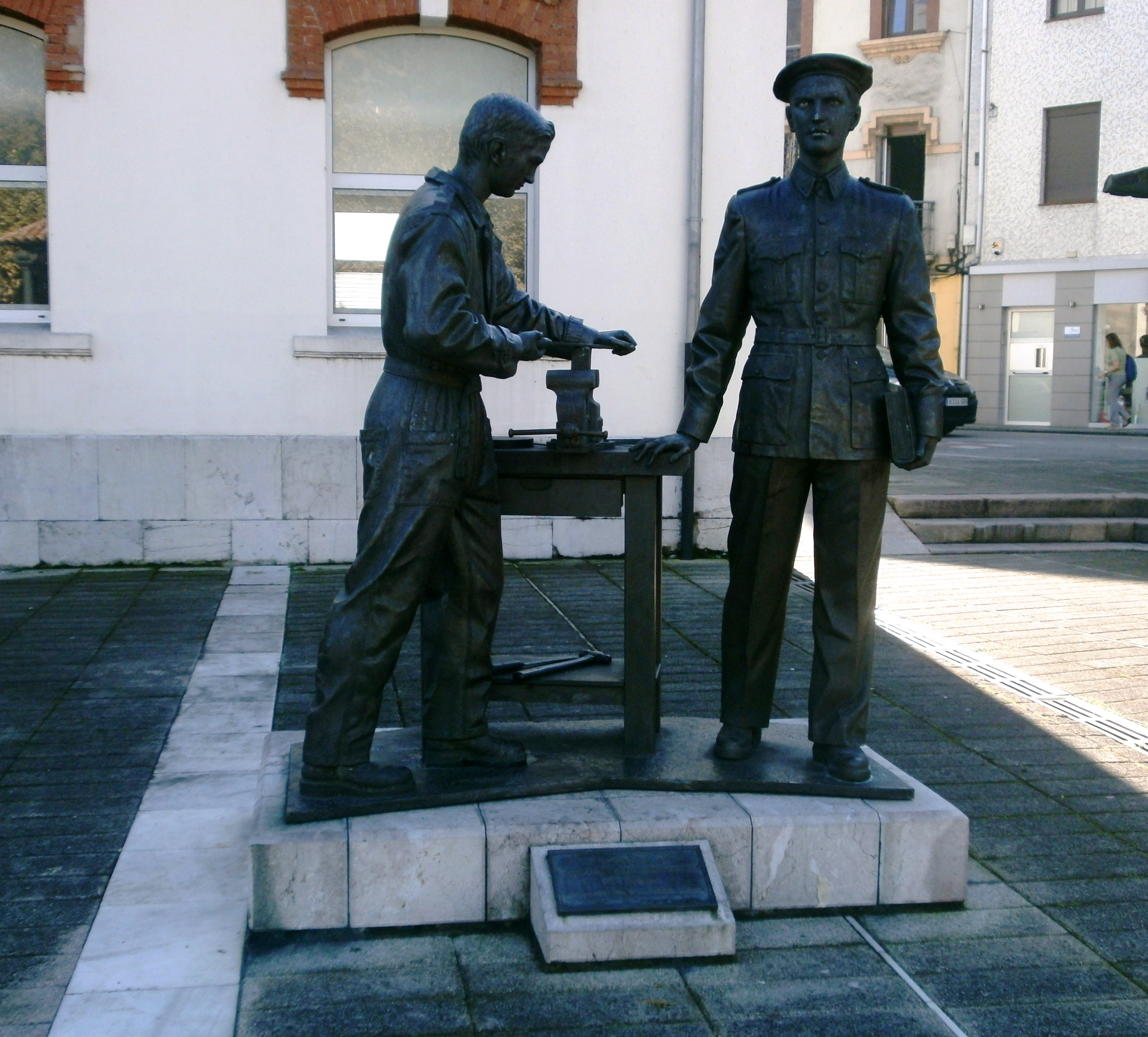 Esculturas en Oviedo al aire libre